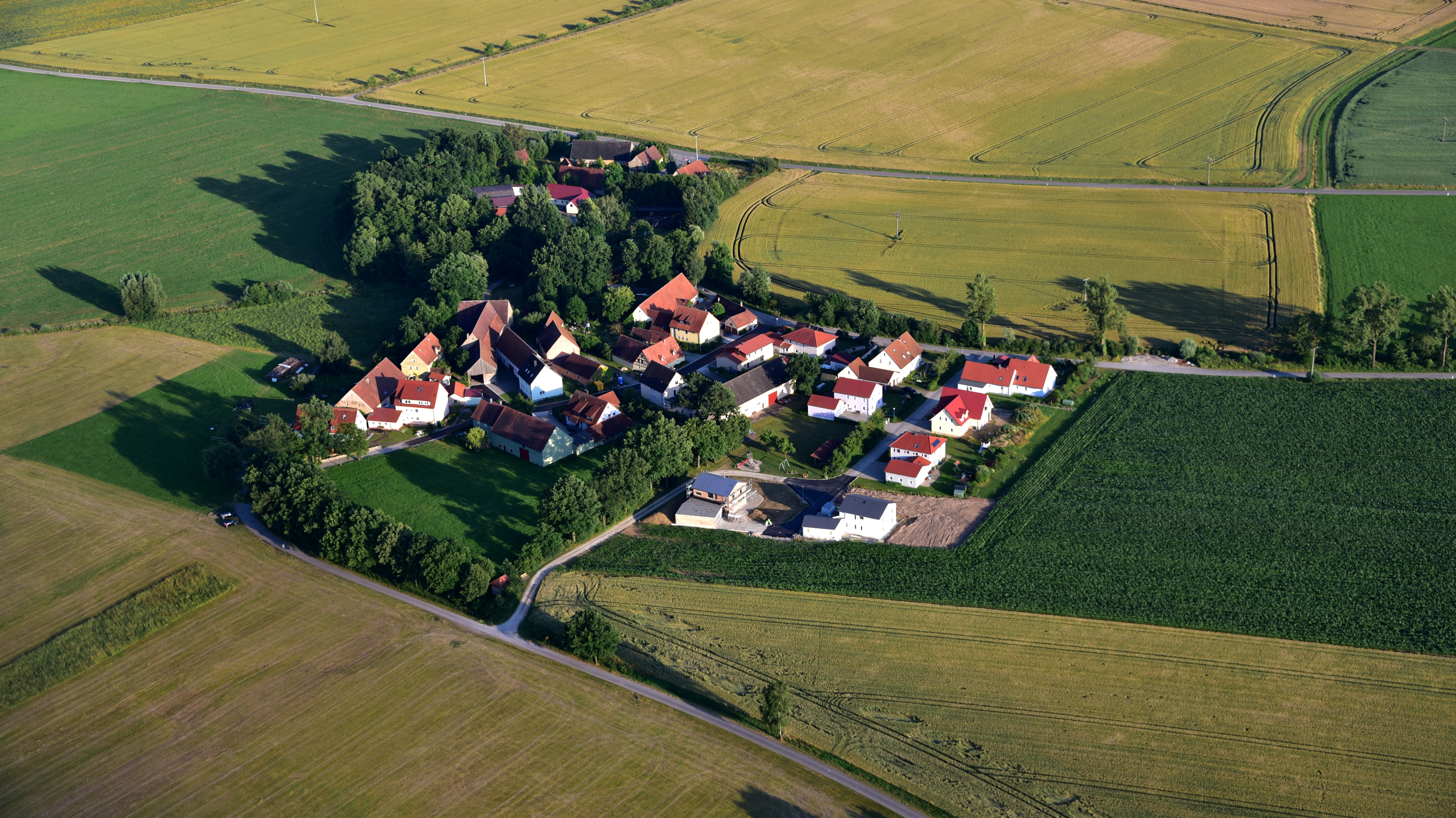 Winn (Herrieden), Luftaufnahme (2016)